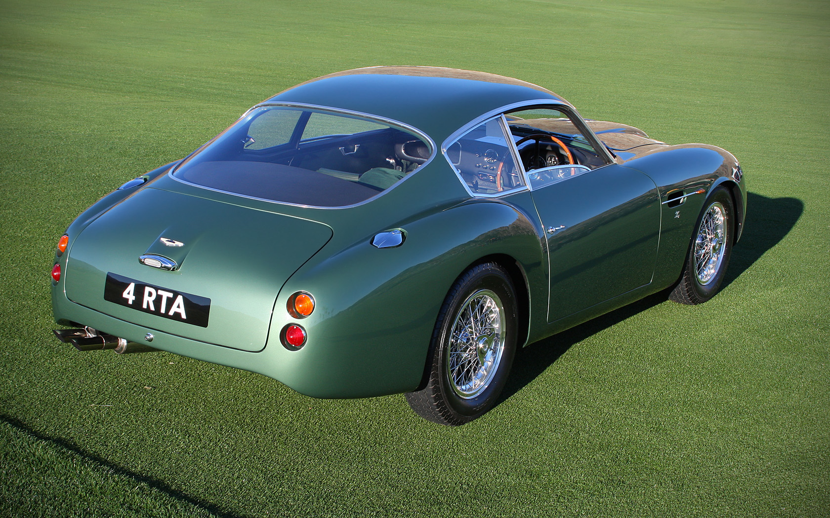 2011 Desert Classic, La Quinta, CA